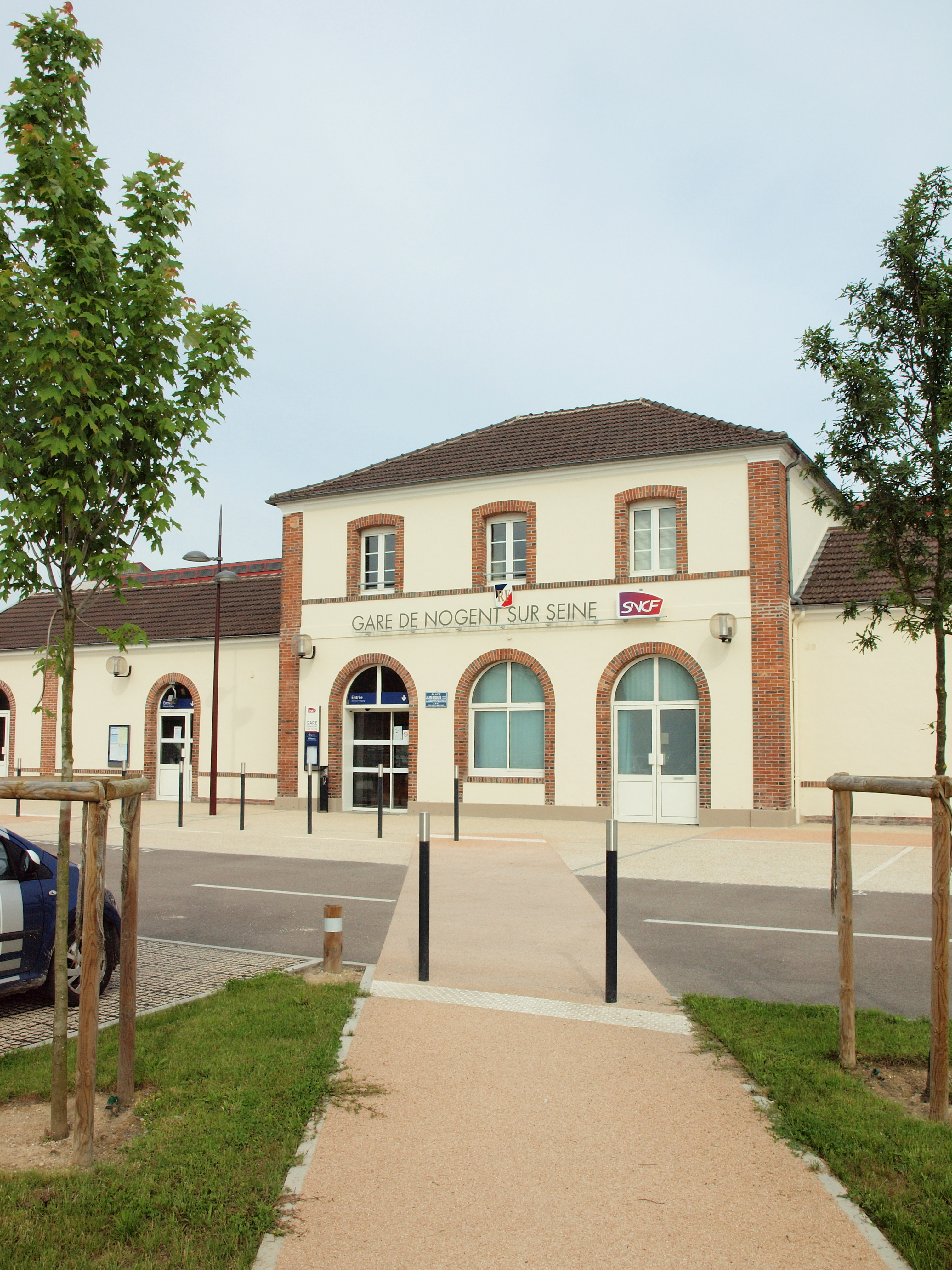 Gare de Nogent-sur-Seine (Aube, France)